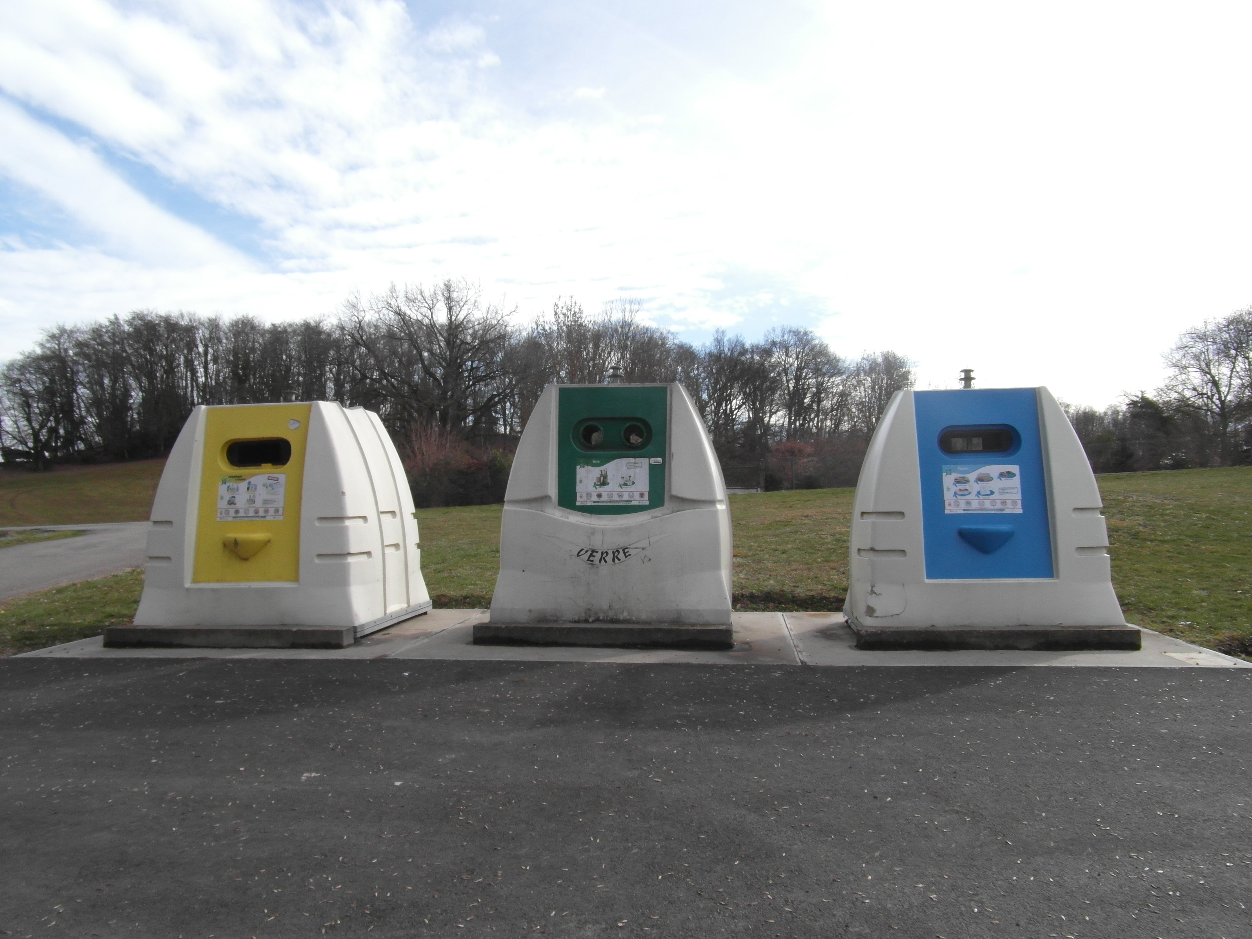 Tri selectif à Chabons en mars 2019